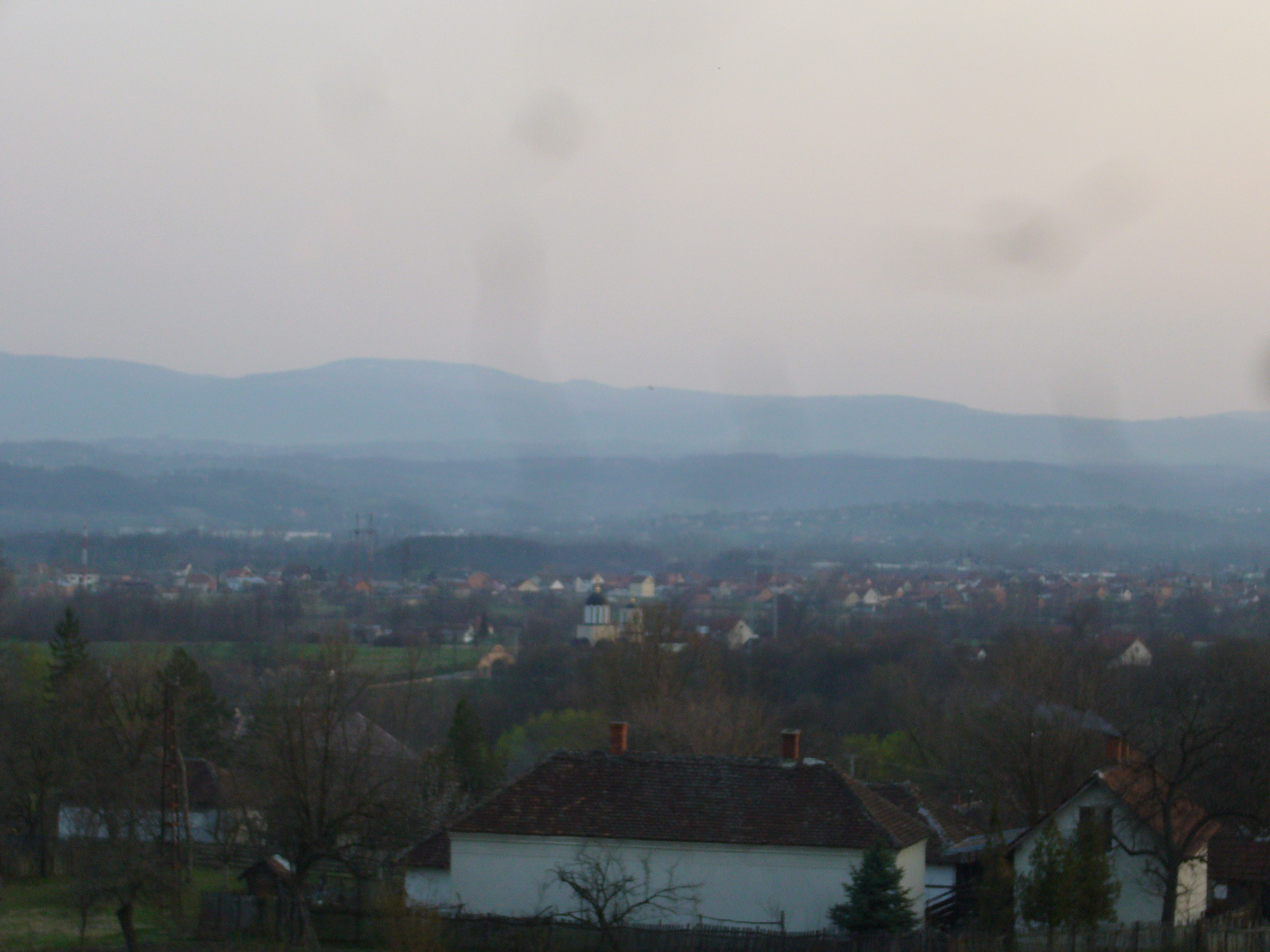 Панорама села Попучке Licensing